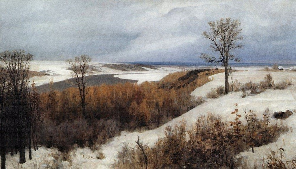 Поленов Василий Дмитриевич (1844-1927). Ранний снег. Бёхово. 1891